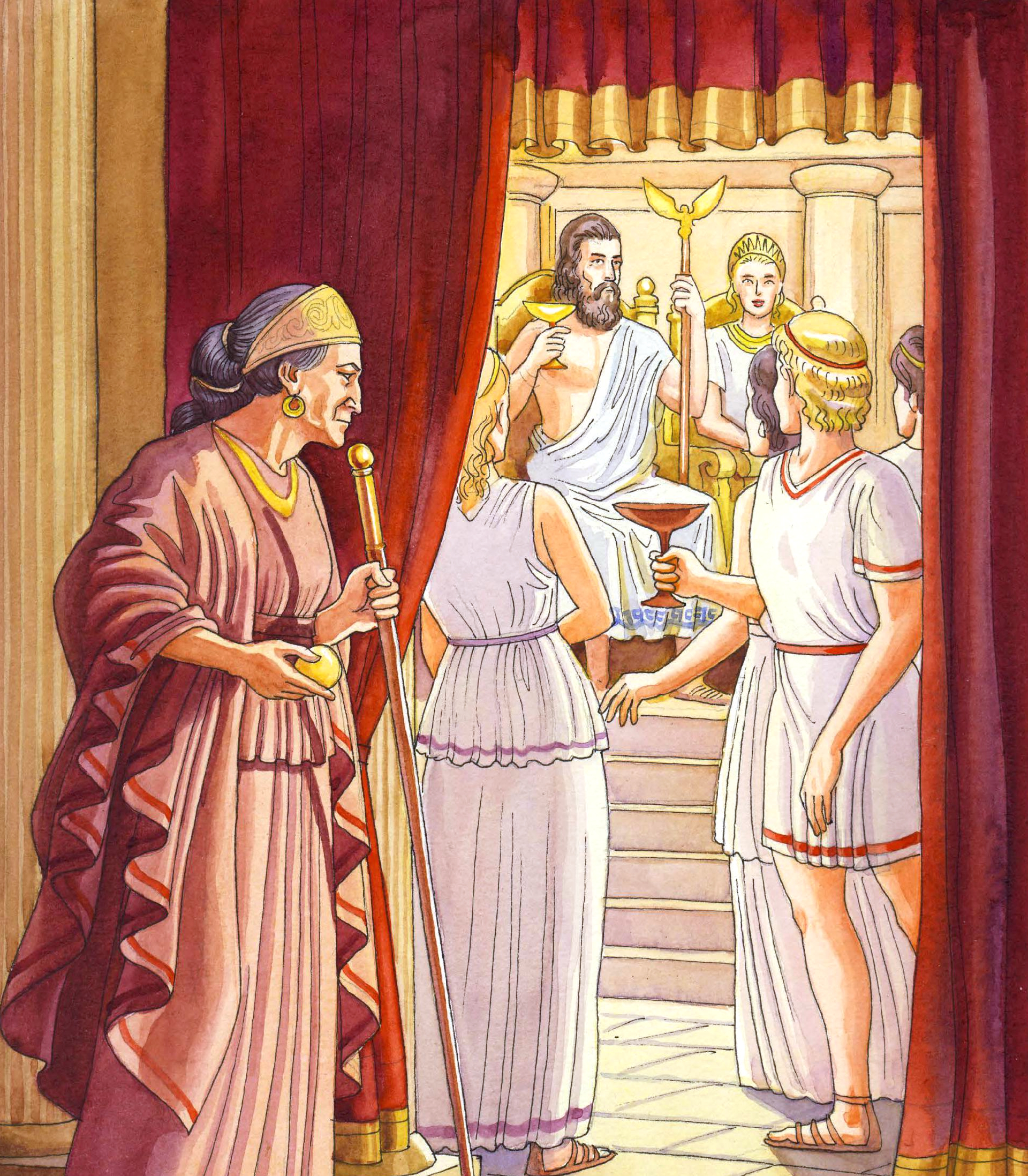 Рисунок «Эрида» из книги Алексея Рябинина «Яблока раздора. Сказка про древних богов, богинь, царей и богатырей». Издательство «Антология», СПб.: 2018 г.